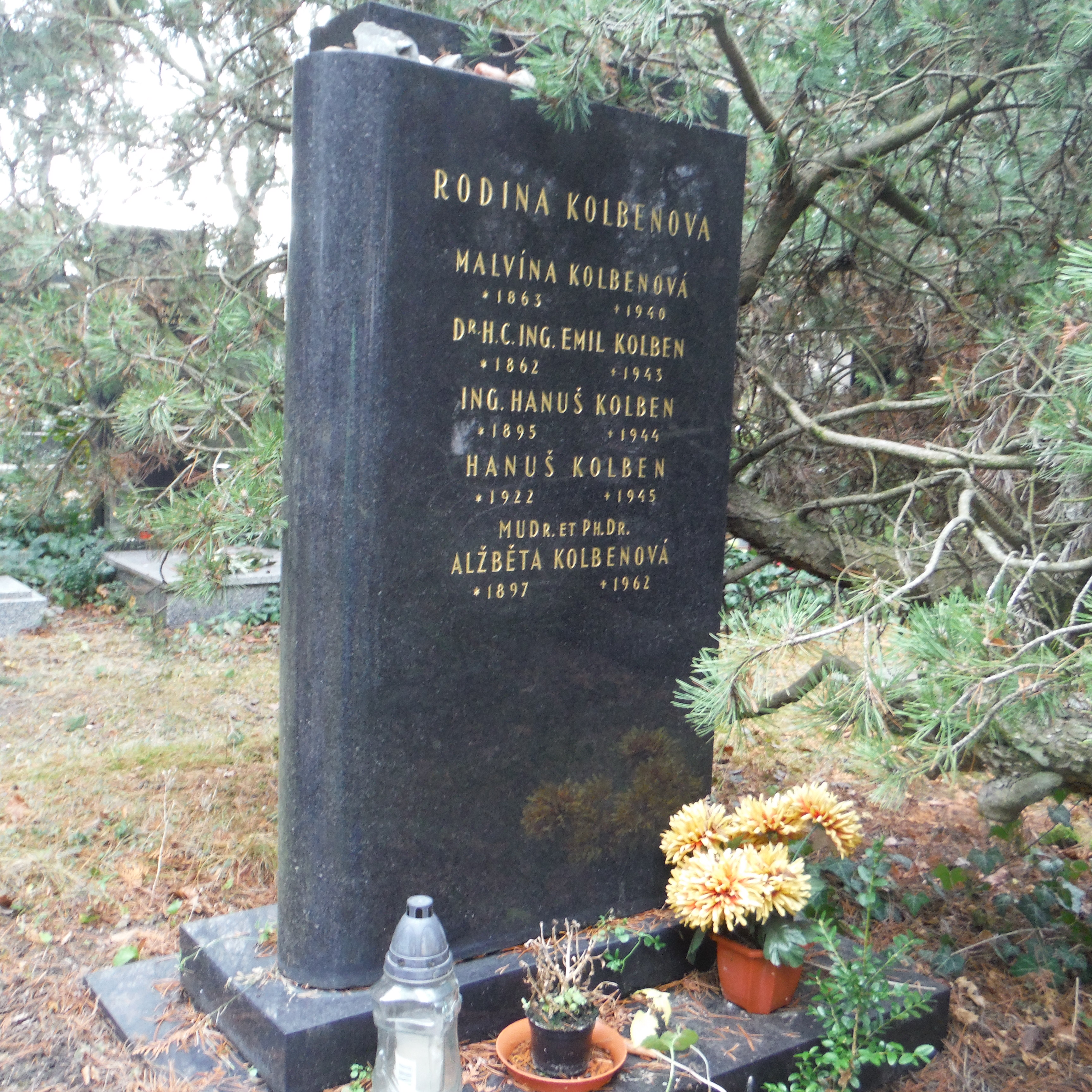 Hrob rodiny Kolbenovy (PA58) na Vinohradském hřbitově